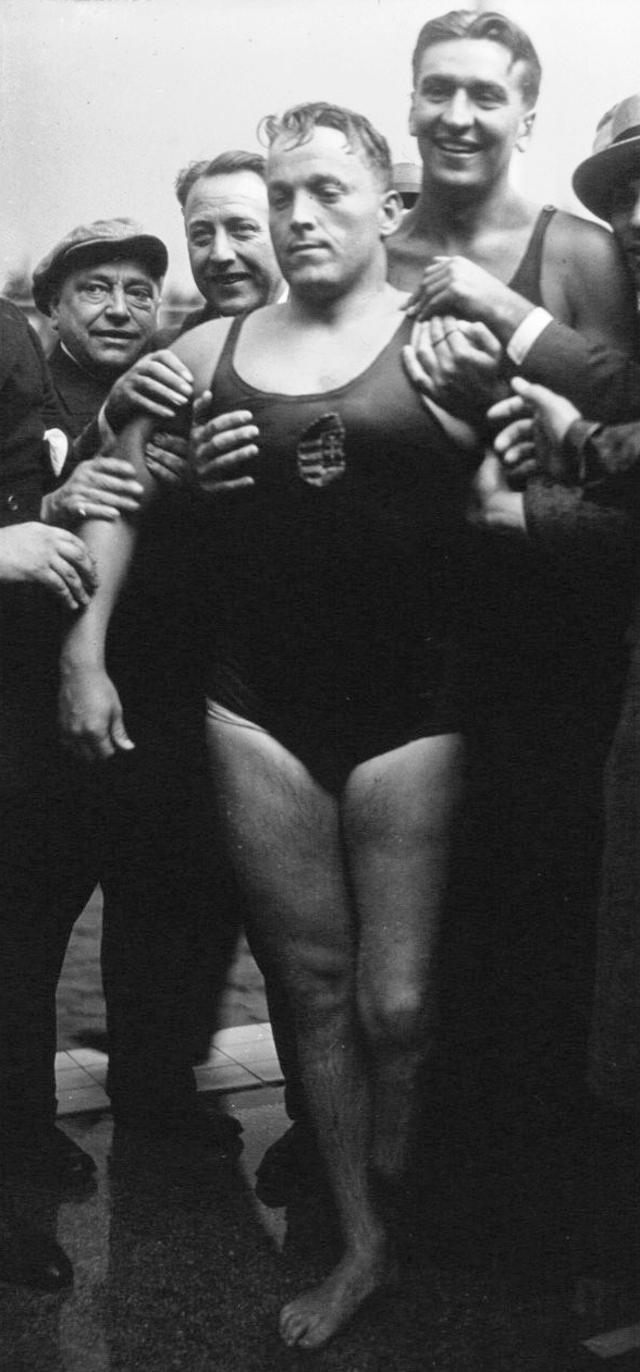 Les Tourelles : Championnats d'Europe : Halassy (Hongrie) (portrait à 3 m) : [photographie de presse] / Agence Meurisse